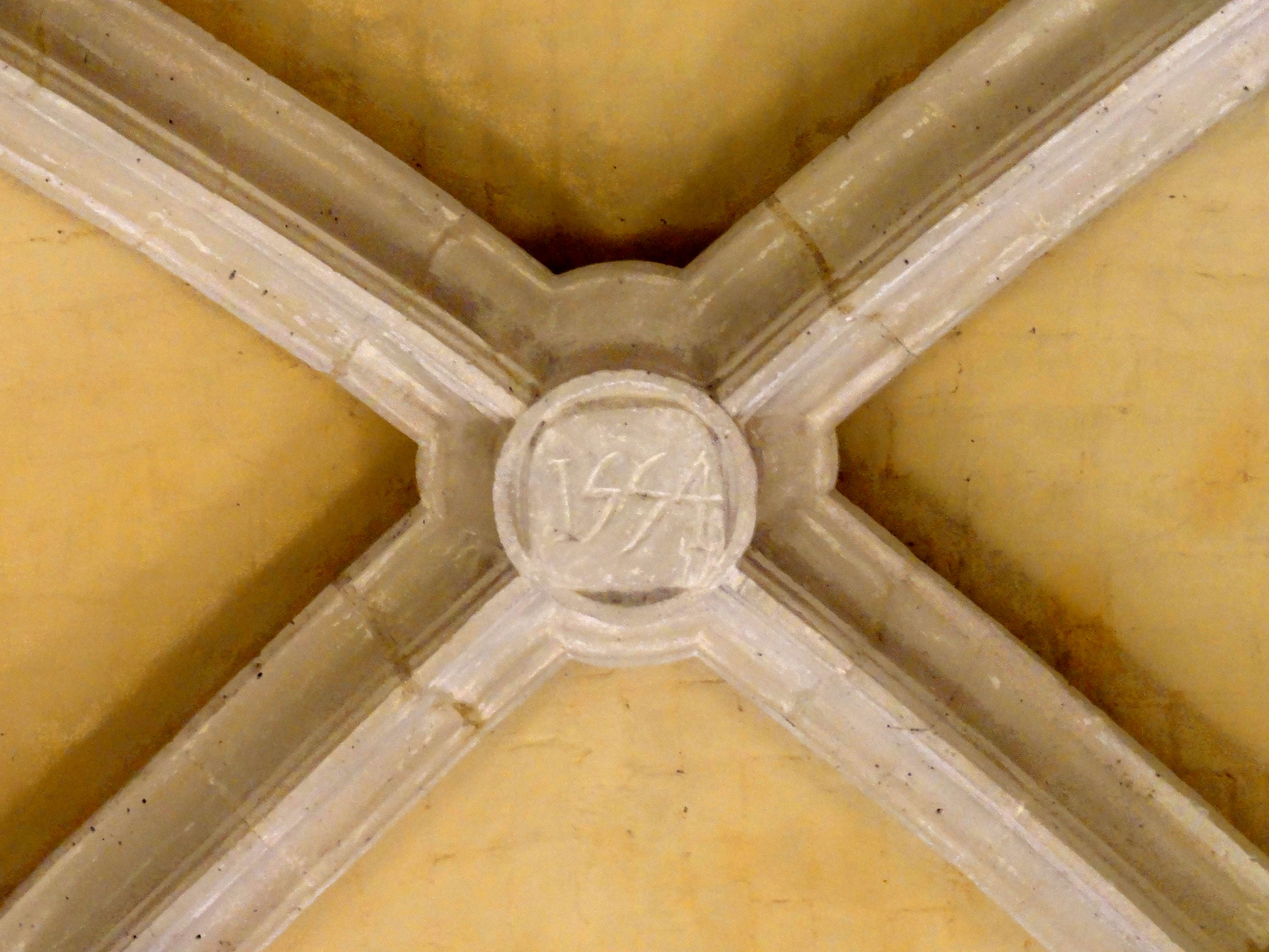 Nef, clé de voûte de la 5e travée portant la date de 1554.